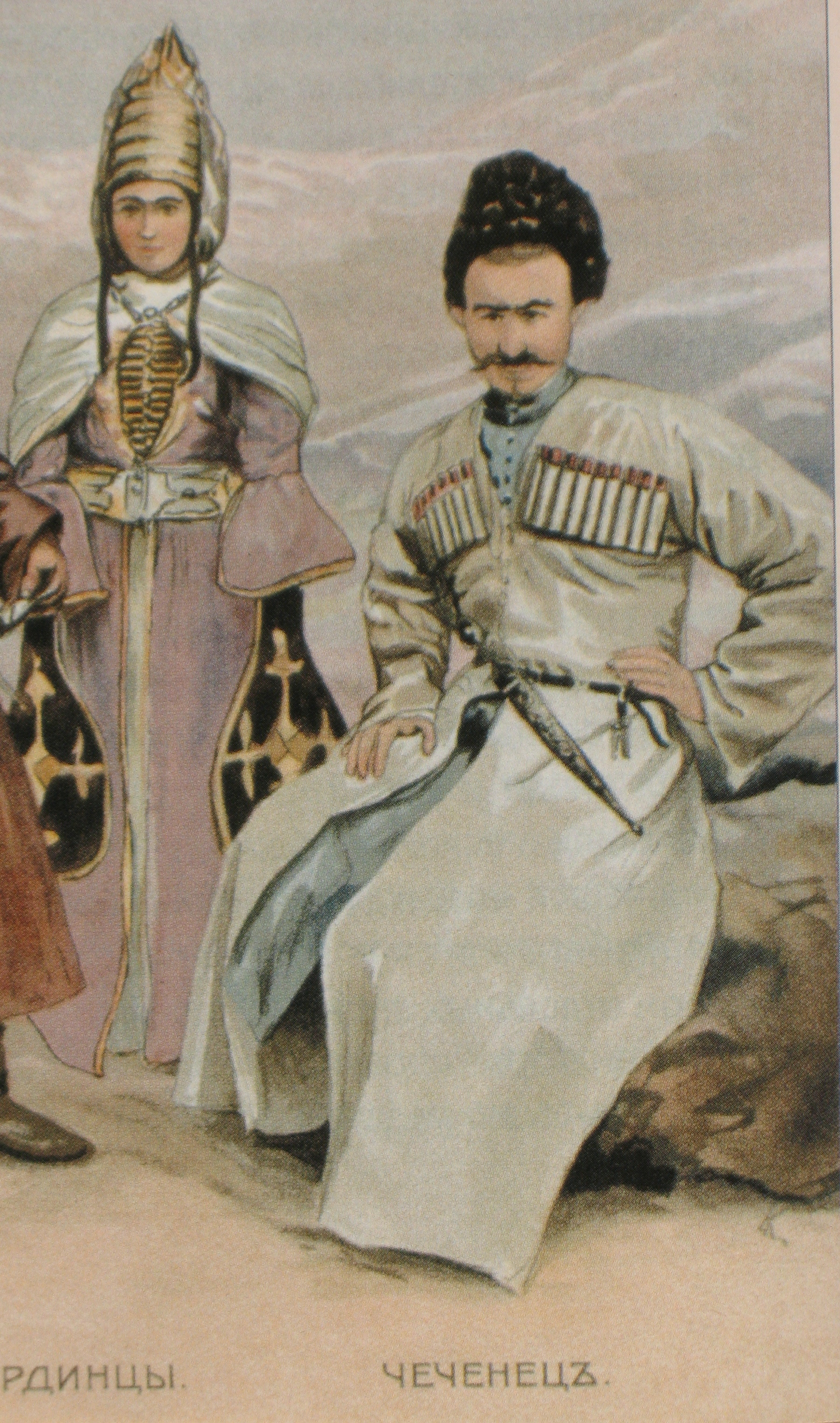 Народы Кавказа. Чеченец (справа) и кабардинка (слева). Русская литография. Конец 19 века.